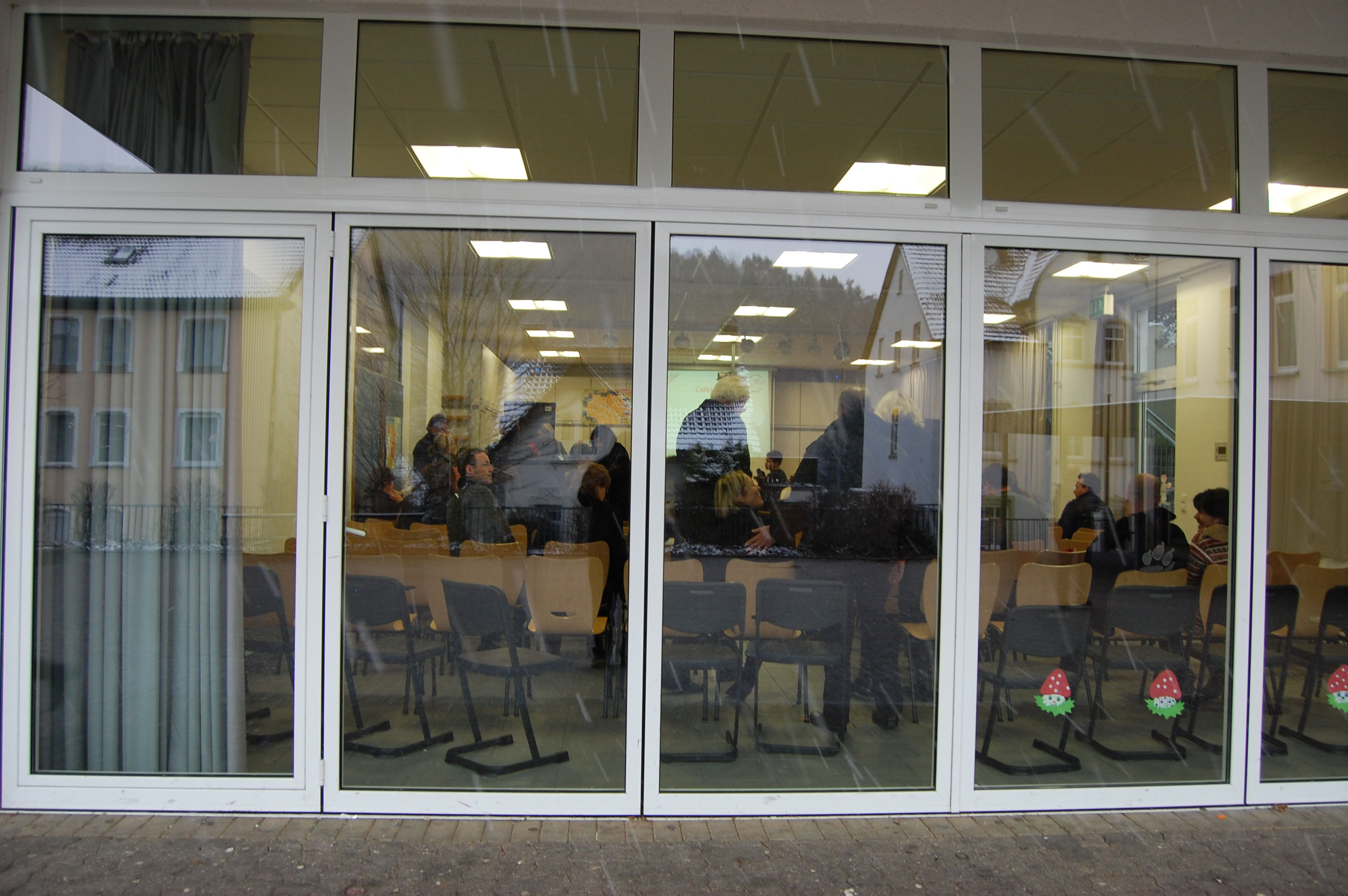 Fachsaal im Hofgebäude der Realschule Schalksmühle in Westfalen